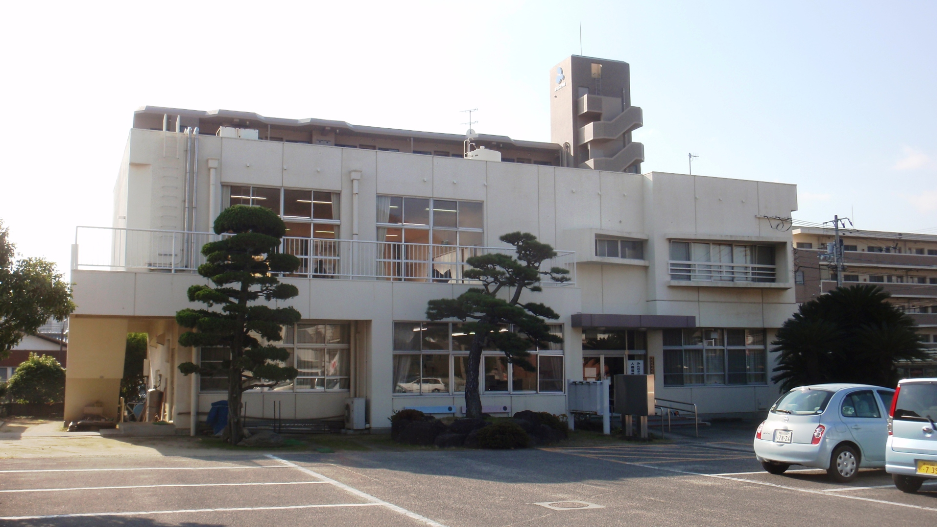 香川県の高松市役所屋島出張所。